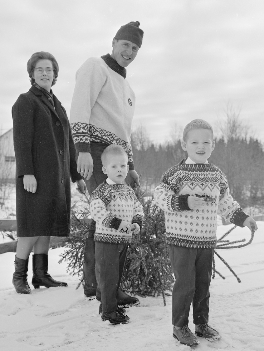 Ole Ellefsæter